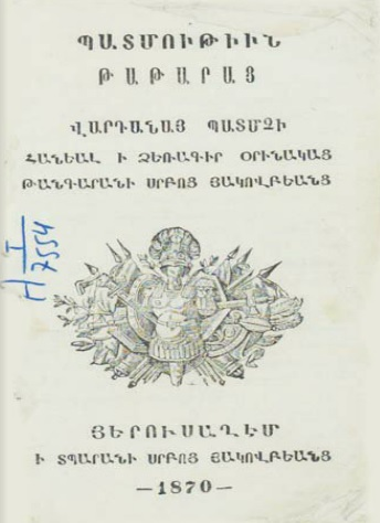 Обложка издания «Истории народа стрелков» армянского историка XIII века Григора Акнерци